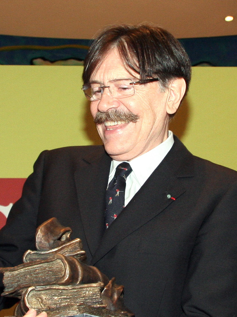 El consejero de Cultura, Turismo y Deporte, Francisco Javier López Marcano, ha entregado esta mañana el I Premio Mayte de Teatro de Cantabria al actor Josep Maria Flotats, en una acto en el que estaba, además del galardonado, la vicepresidenta de la Fundación Mayte, Gema Sánchez. Este reconocimiento le fue concedido al actor catalán en el transcurso de una cena celebrada el pasado día 6 en el Palacio de la Magdalena y que ponía fin al I Encuentro Nacional de Teatro, patrocinado por la Consejería de Cultura, Turismo y Deporte y la Fundación Mayte.